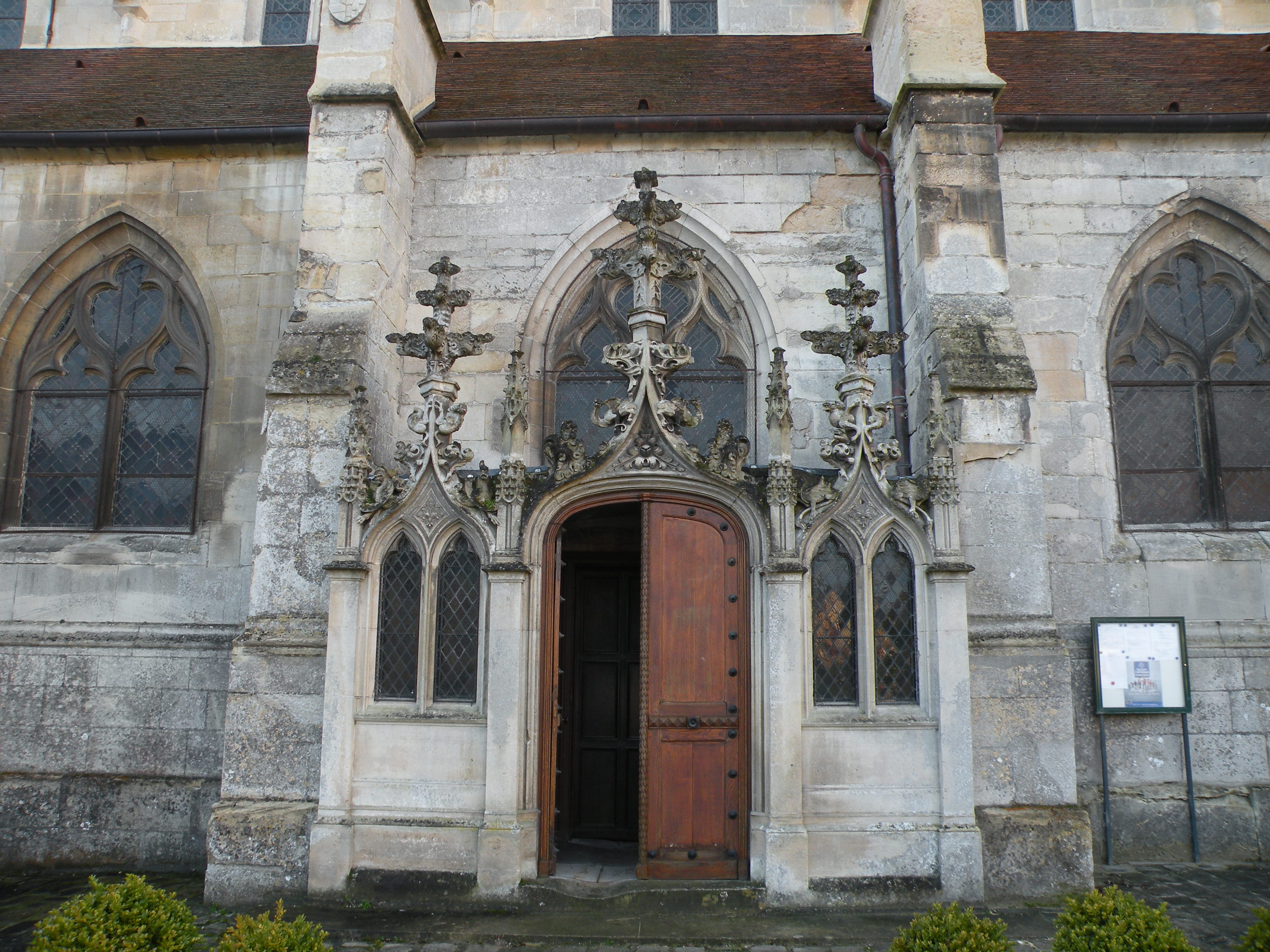 Église Saint-Pierre-et-Saint-Paul de Précy-sur-Oise, exterieur.